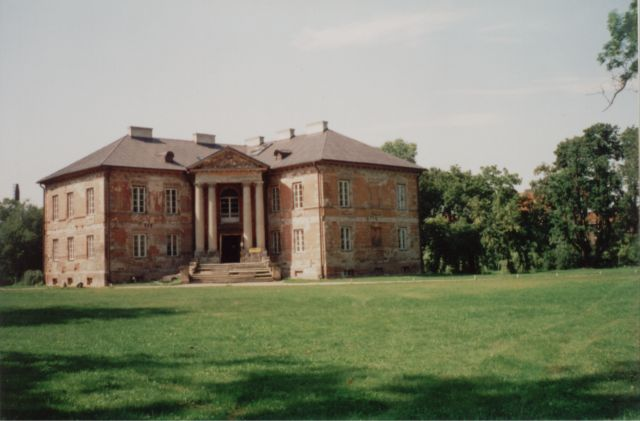 Muzeum: Zespół Pałacowo Parkowy w Dobrzycy, woj. wielkopolskie, powiat pleszewski, gmina Dobrzyca, Pałac Gorzeńskich w Dobrzycy. Stan przed remontem